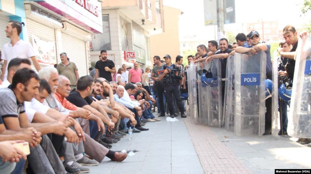 Diyarbakır'da kayyım atanmasının 3. gününde gerçekleşen protestolar